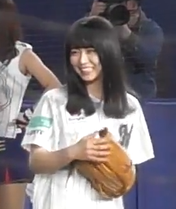 元欅坂46のメンバー長濱ねるです。